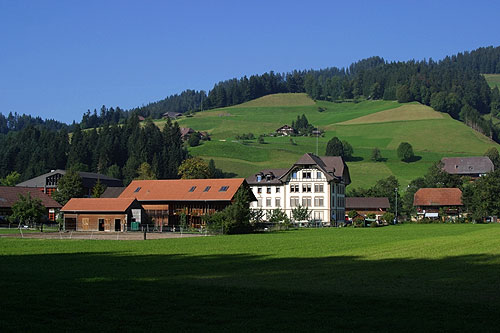 Altes Schulhaus von Eggiwil, Gemeinde im Amtsbezirk Signau, Kantons Bern, Schweiz